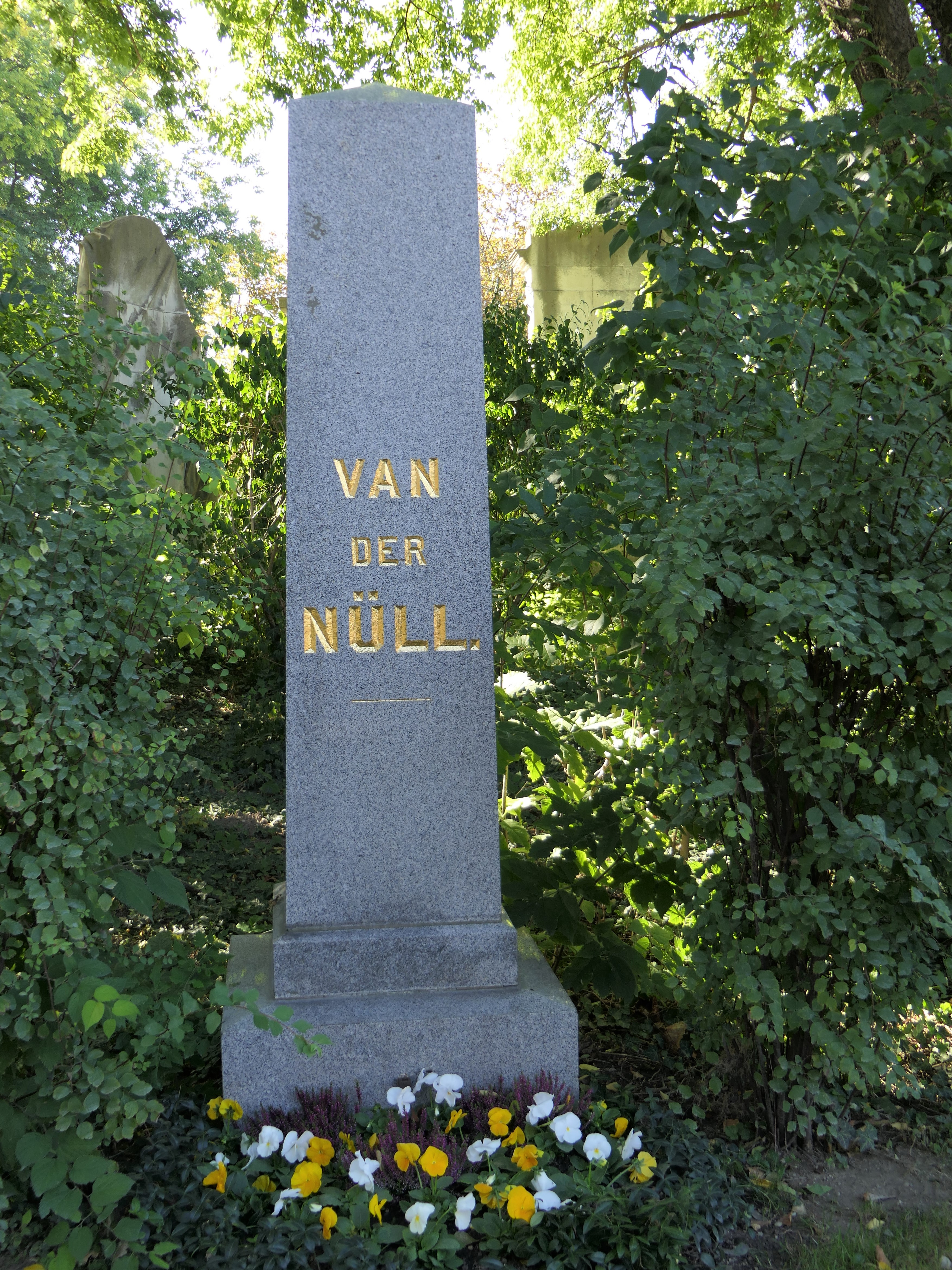 Grab von Eduard van der Nüll auf dem Wiener Zentralfriedhof